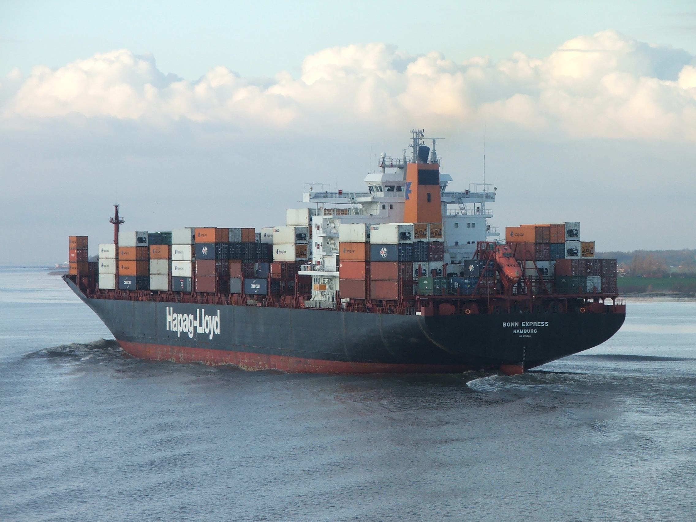 Containermotorschiff Bonn Express der Reederei Hapag Lloyd, elbeinlaufend 2009 Information about Bonn Express may be found at IMO 8711368. A ship can change her name and flag state through time, but the IMO number remains the same through the hull's entire lifetime. Therefore, it's useful to identify a ship through her IMO number.